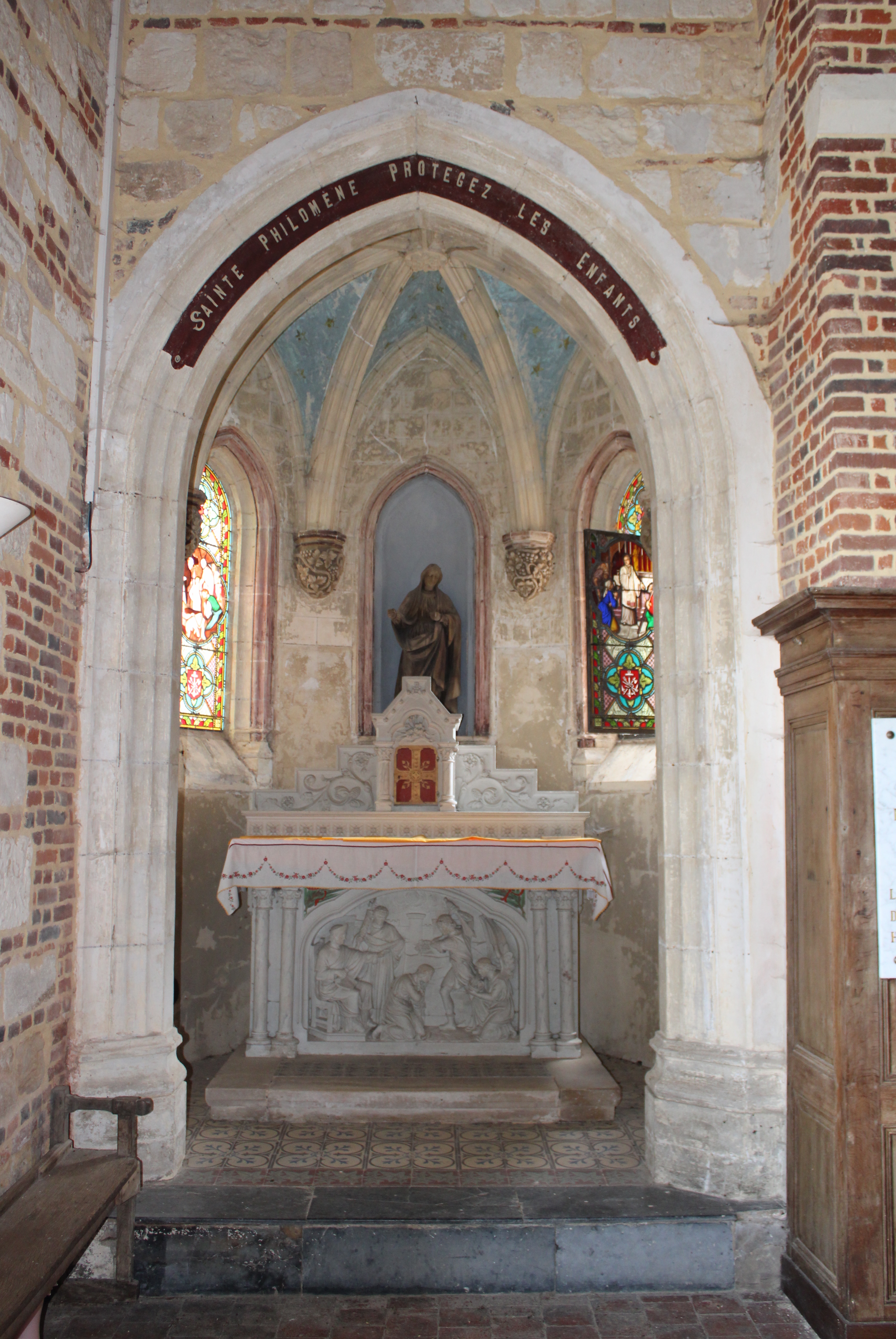 Eglise Saint-Martin d'Harcigny